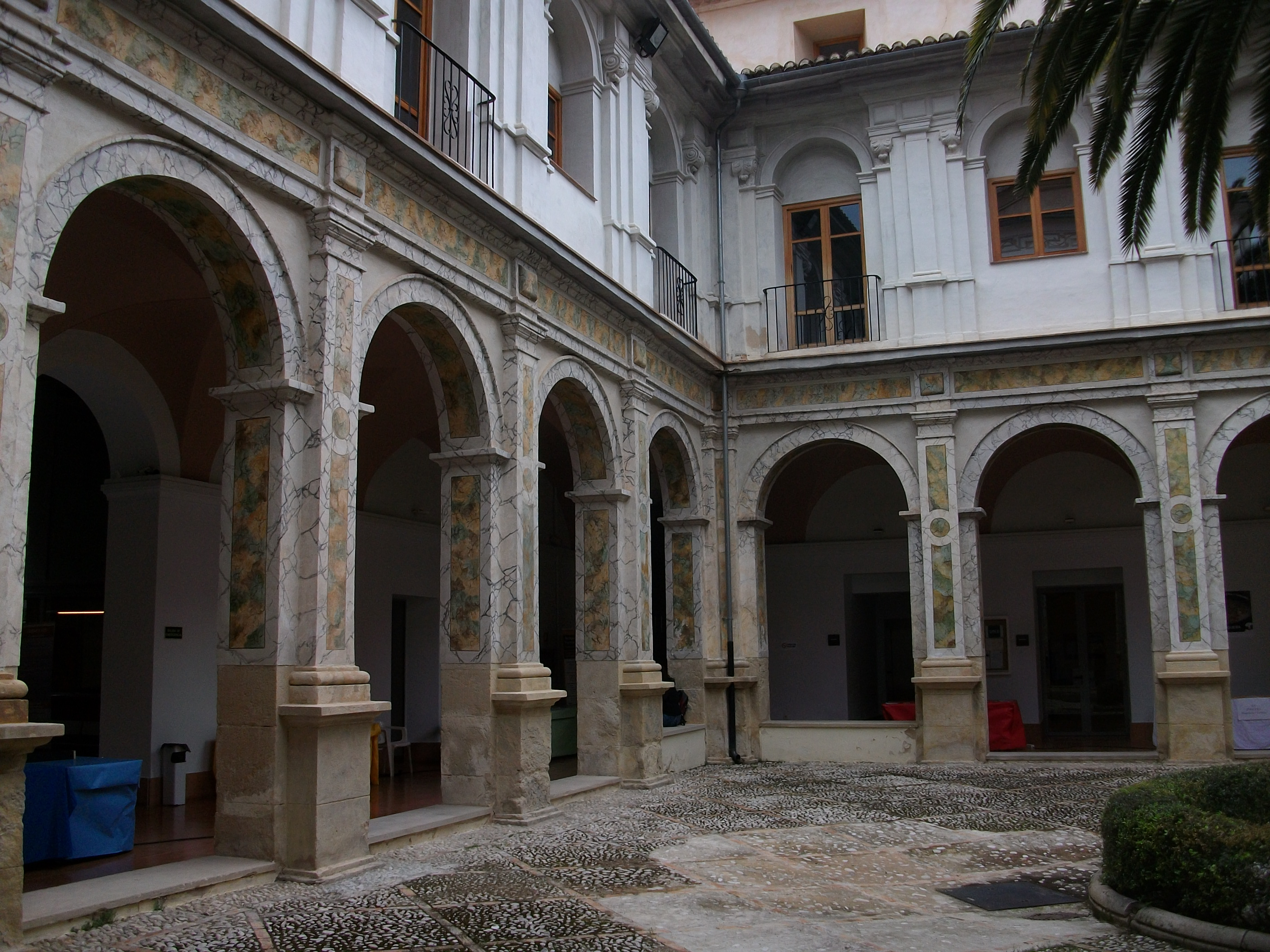 Xàtiva, claustre de l'antic convent de sant Agustí.